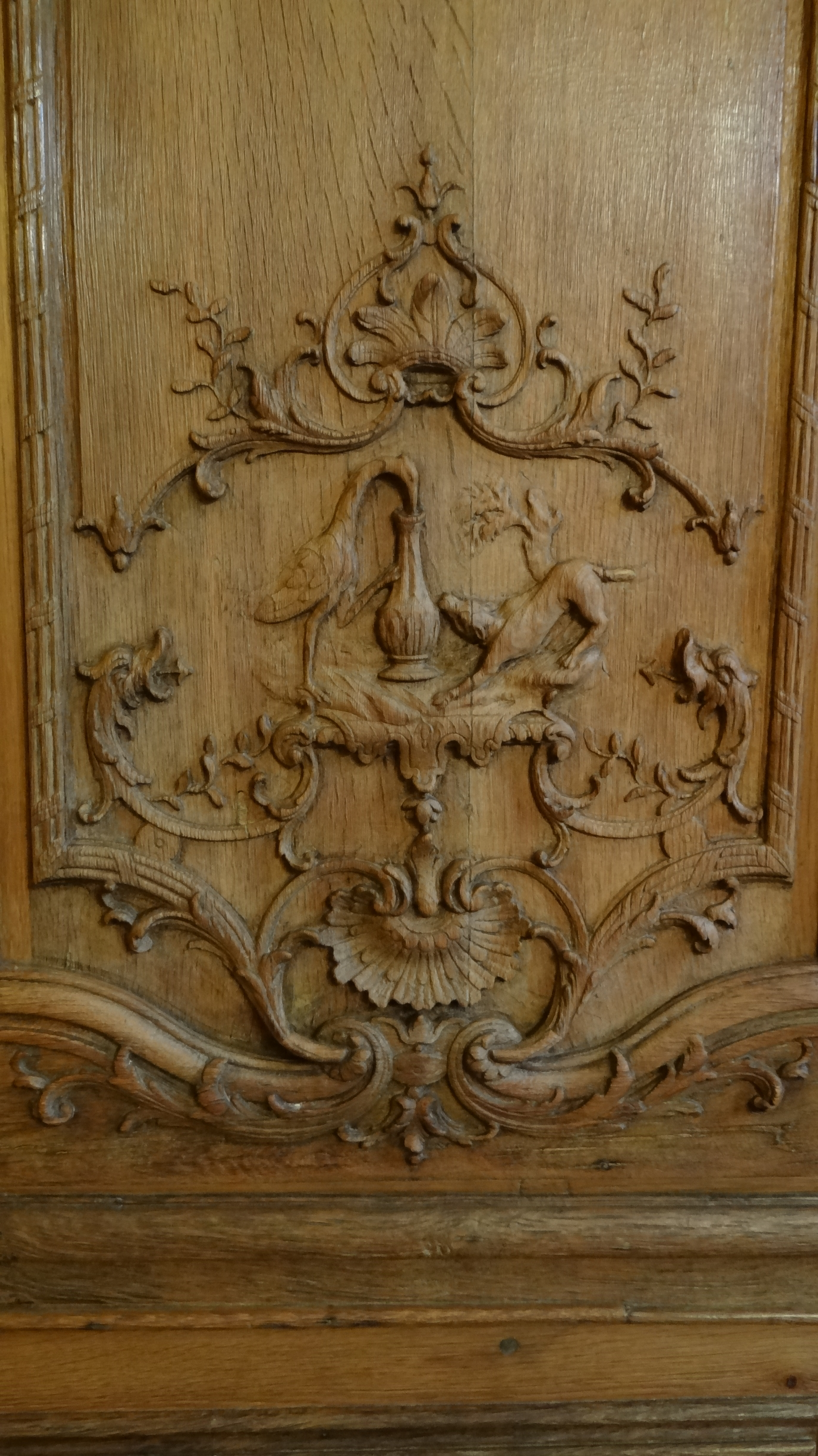 fable de La Fontaine, la cigogne et le renard, Boiseries de la salle à manger de l'Hôtel de Noirmoutier, Paris .